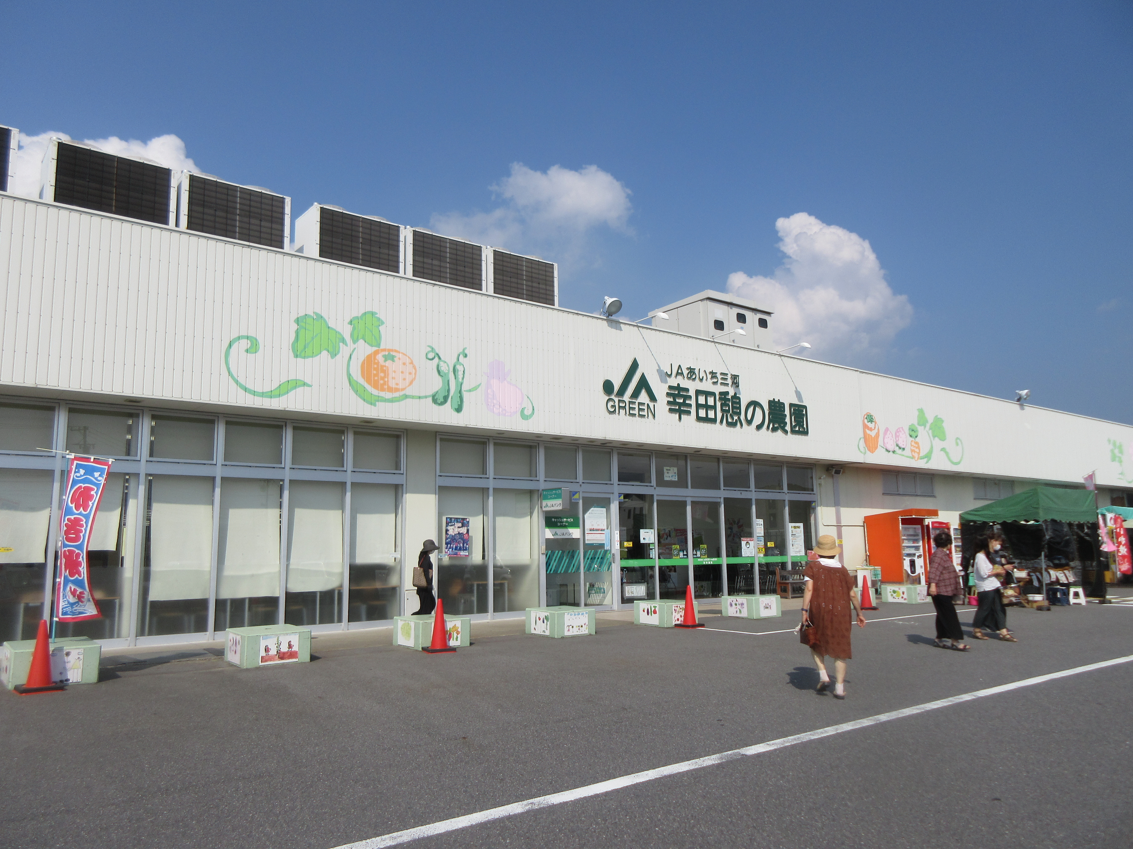 幸田憩の農園（愛知県幸田町大字大草）